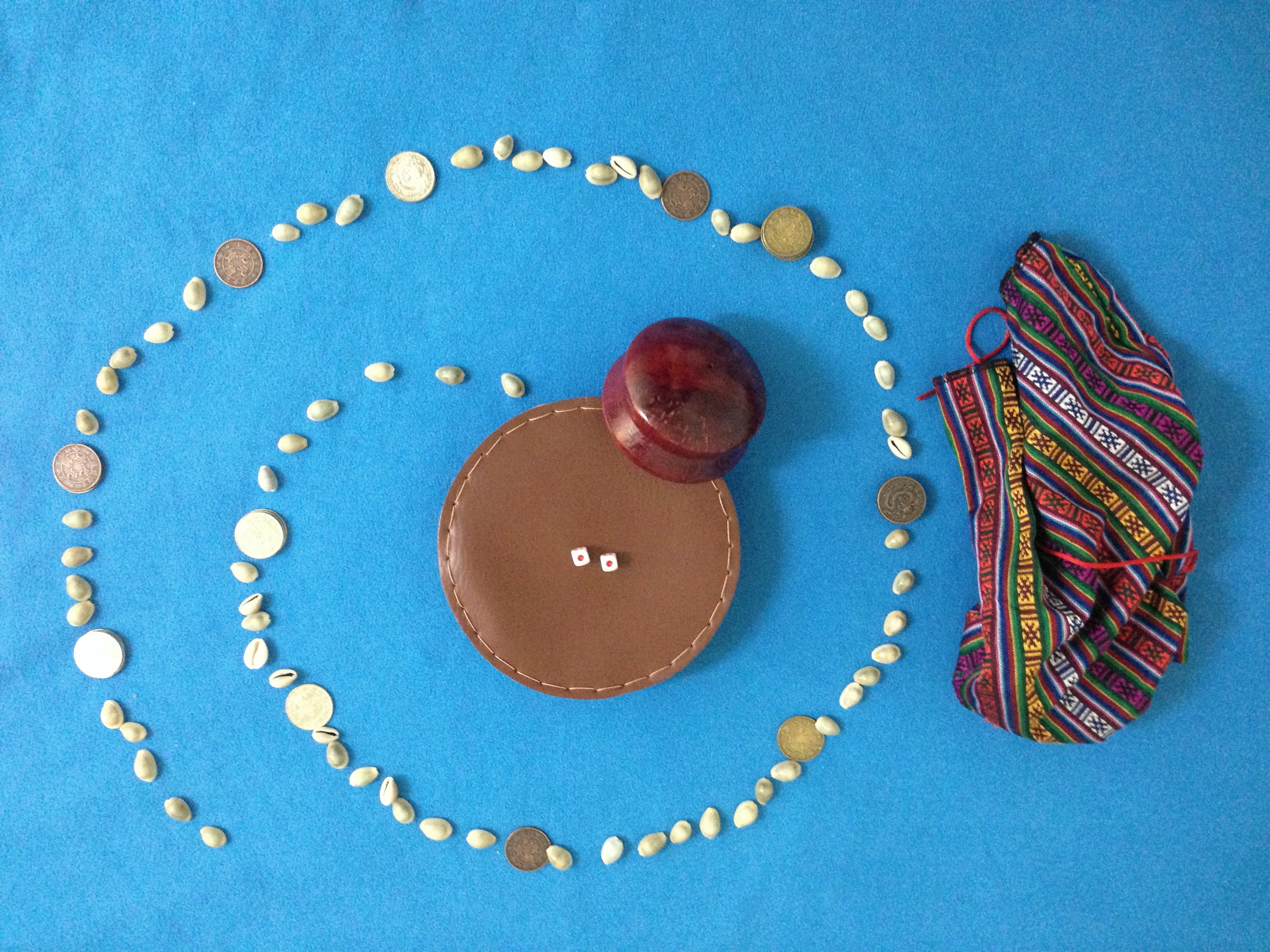 西藏雙六的博具